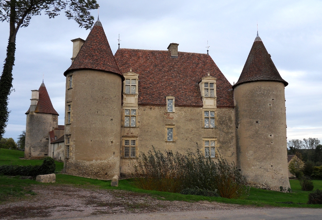 Château de Chareil-Cintrat (Classé) .